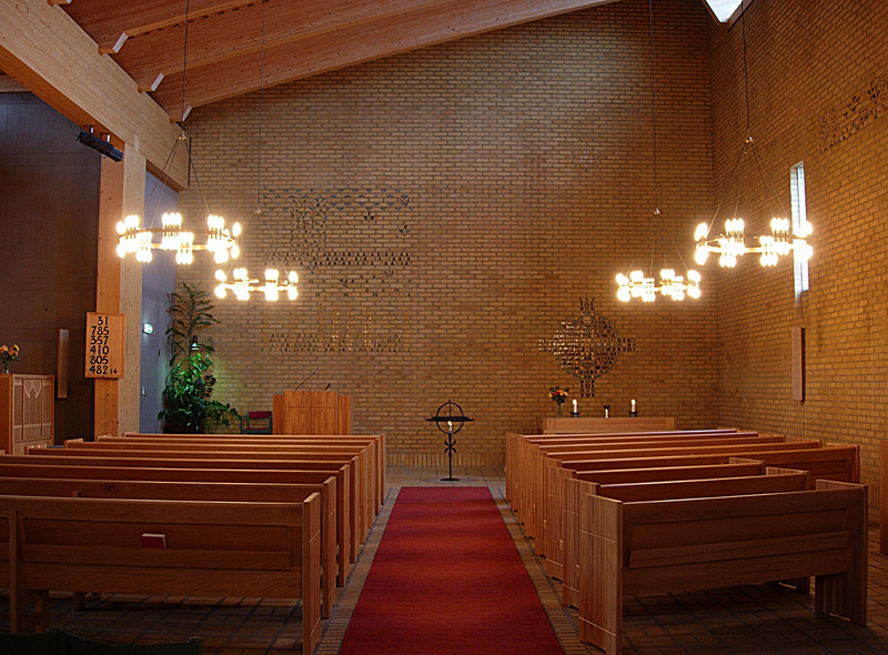 Flatåskyrkans kyrksal med Ralph Bergholtz och Randi Fishers bilder i glaserat tegel. Flatåskyrkan, Göteborg, den 30 oktober 2005. Bilden är fotograferad av Owe Nilsson.